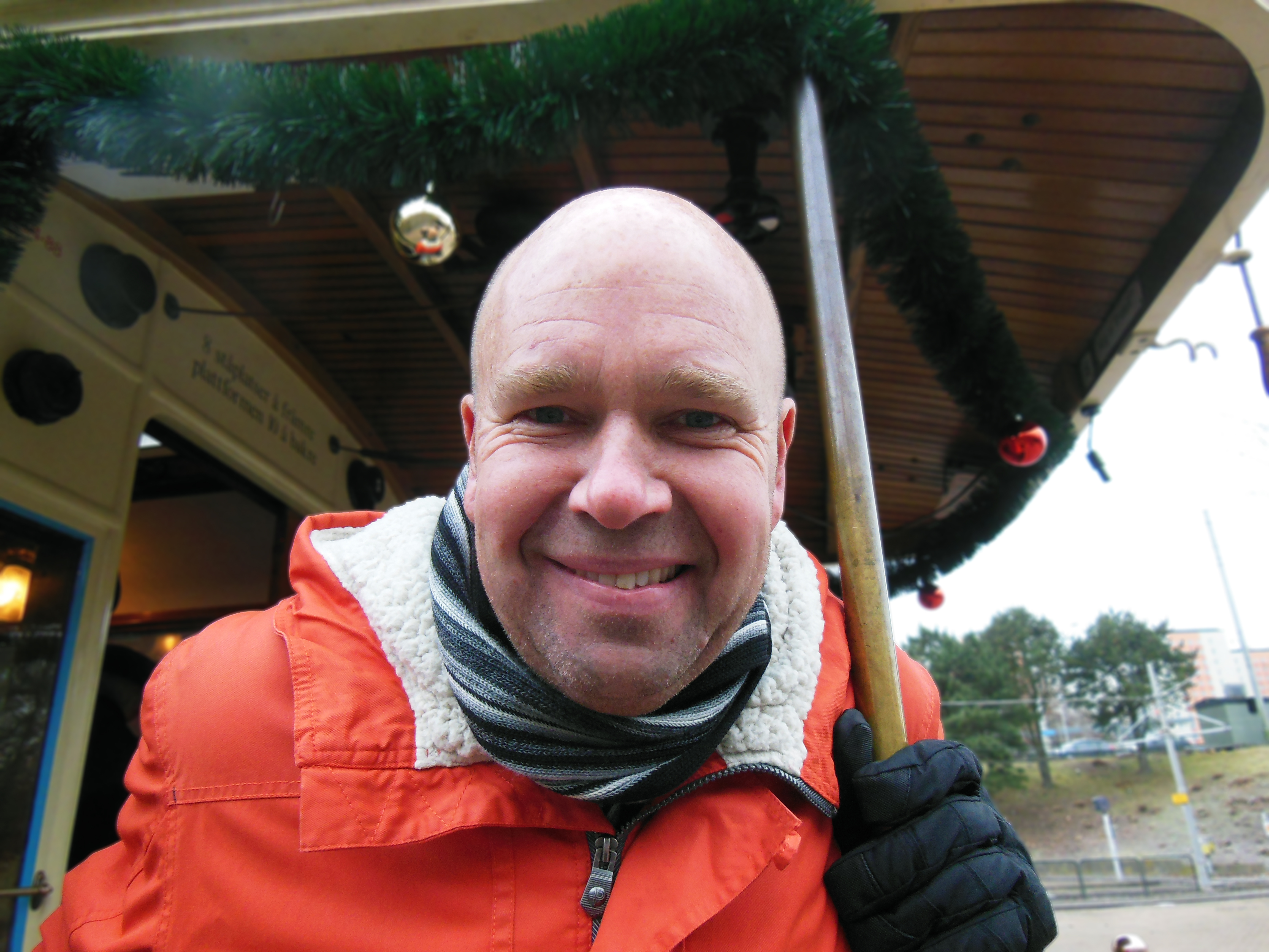 Lasse Kronér ombord på "Julklappsvagnen" (M1 15) i december 2016.